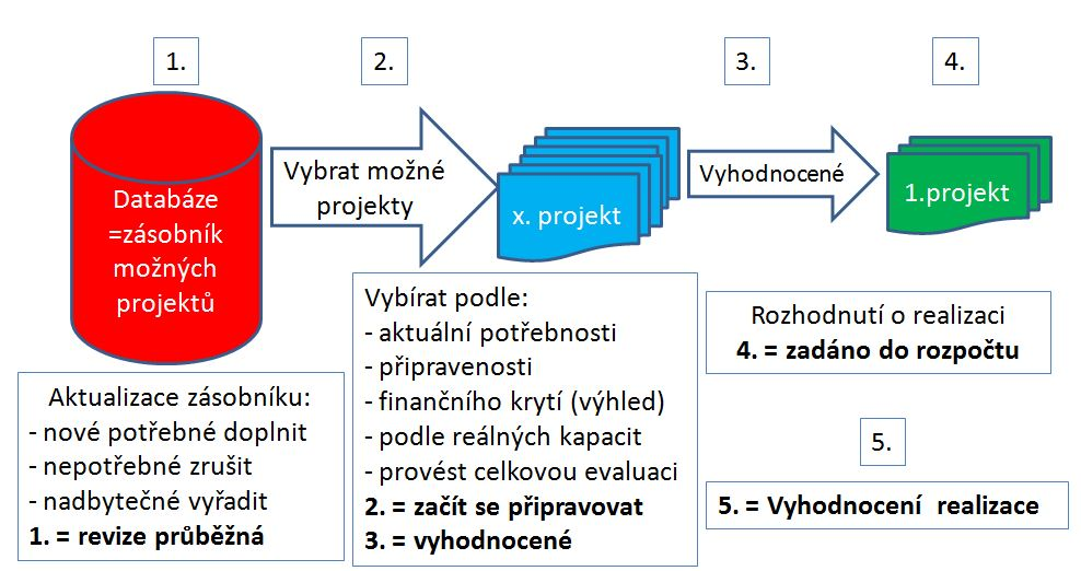 Národní investiční plán - jak je strategie realizace str.2 až str.17